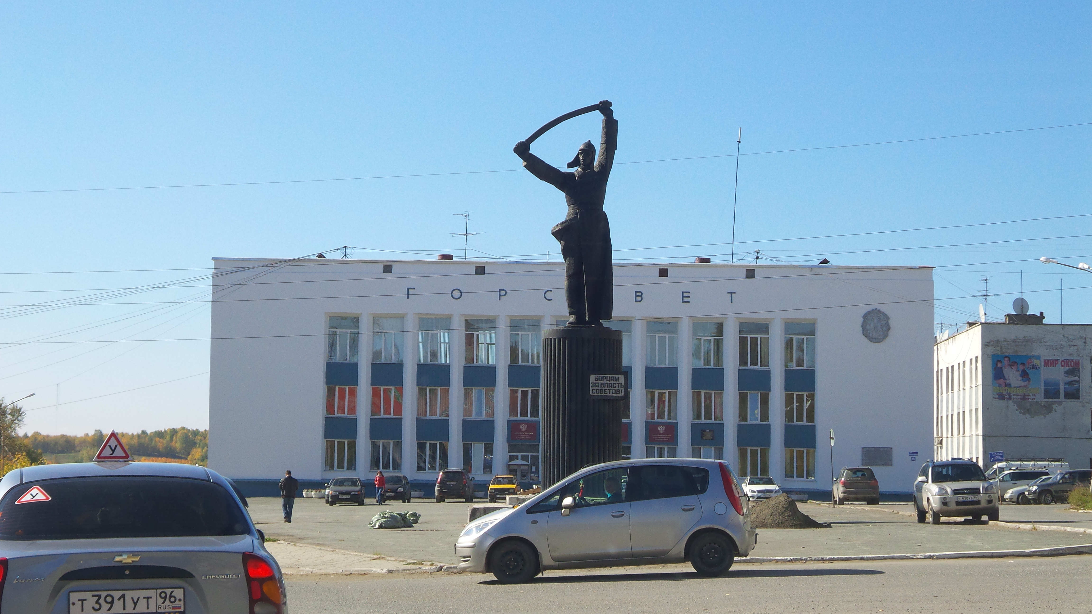 Памятник борцам за власть Советов: площадь Советов, Кушва, Свердловская область